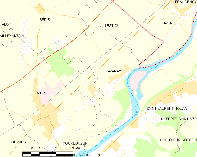 Carte des communes de France, centrée sur Avaray (Loir-et-Cher, code Insee 41008)